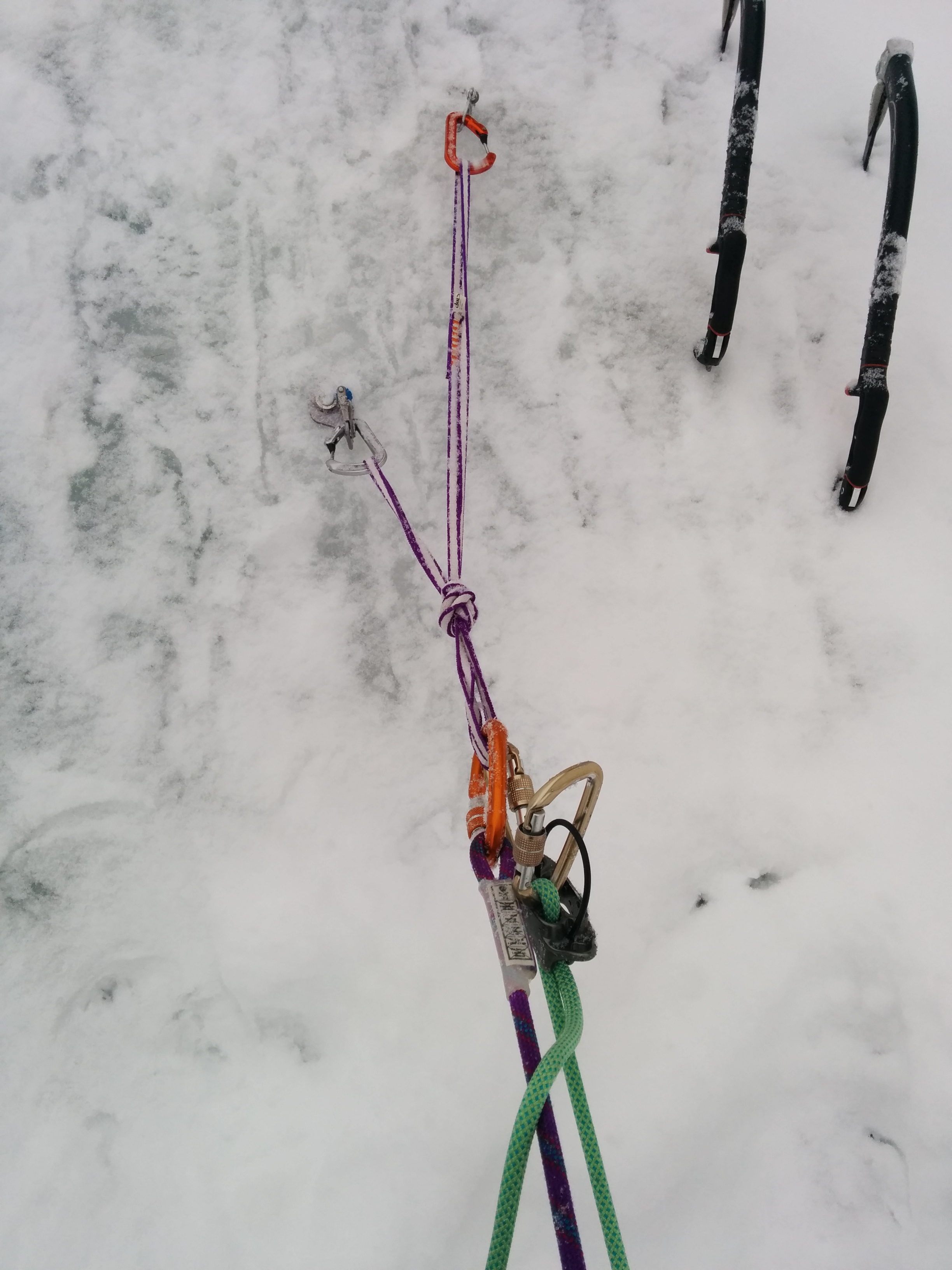 Relais sur broche